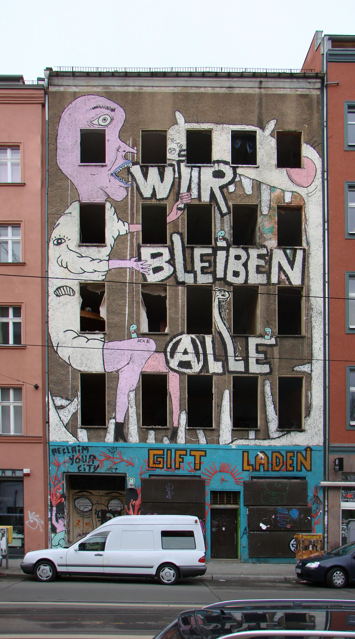 Geräumtes Wohnprojekt Brunnestr. 183 "Wir bleiben alle"